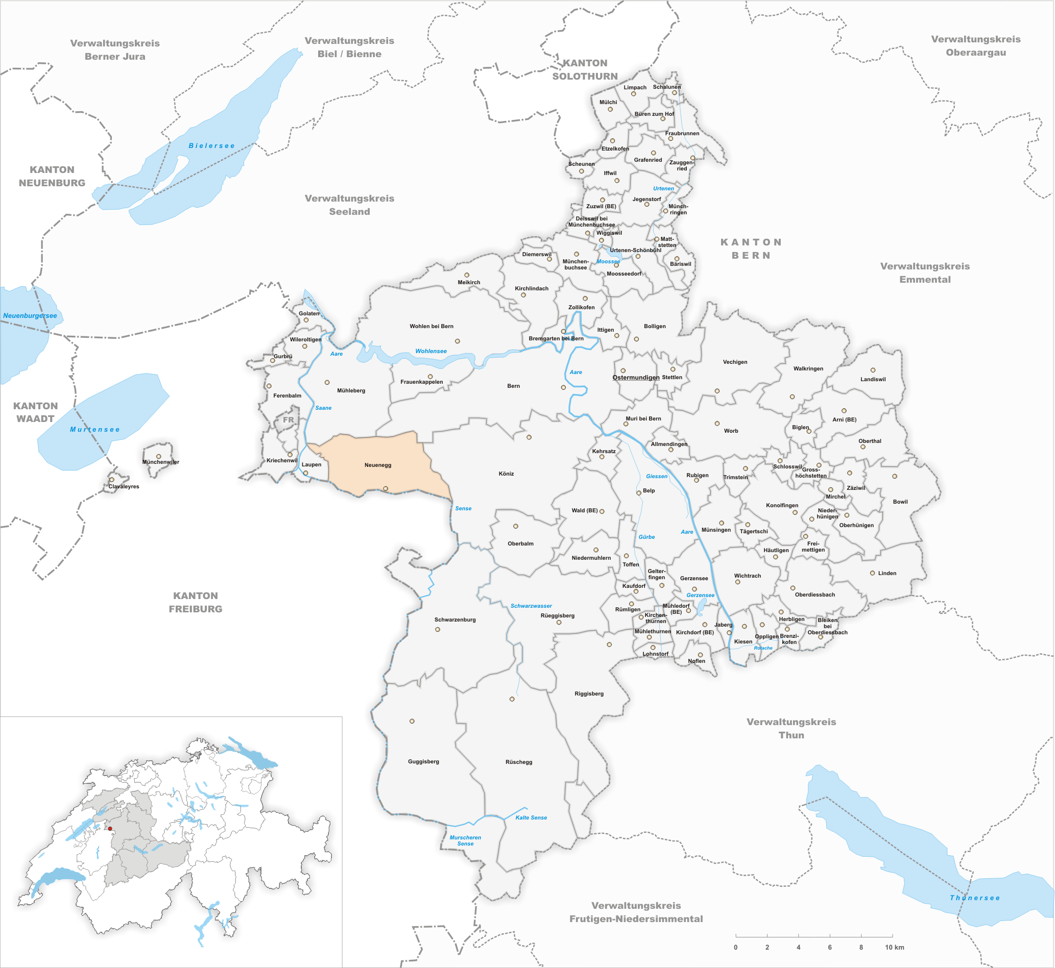 Municipality Neuenegg